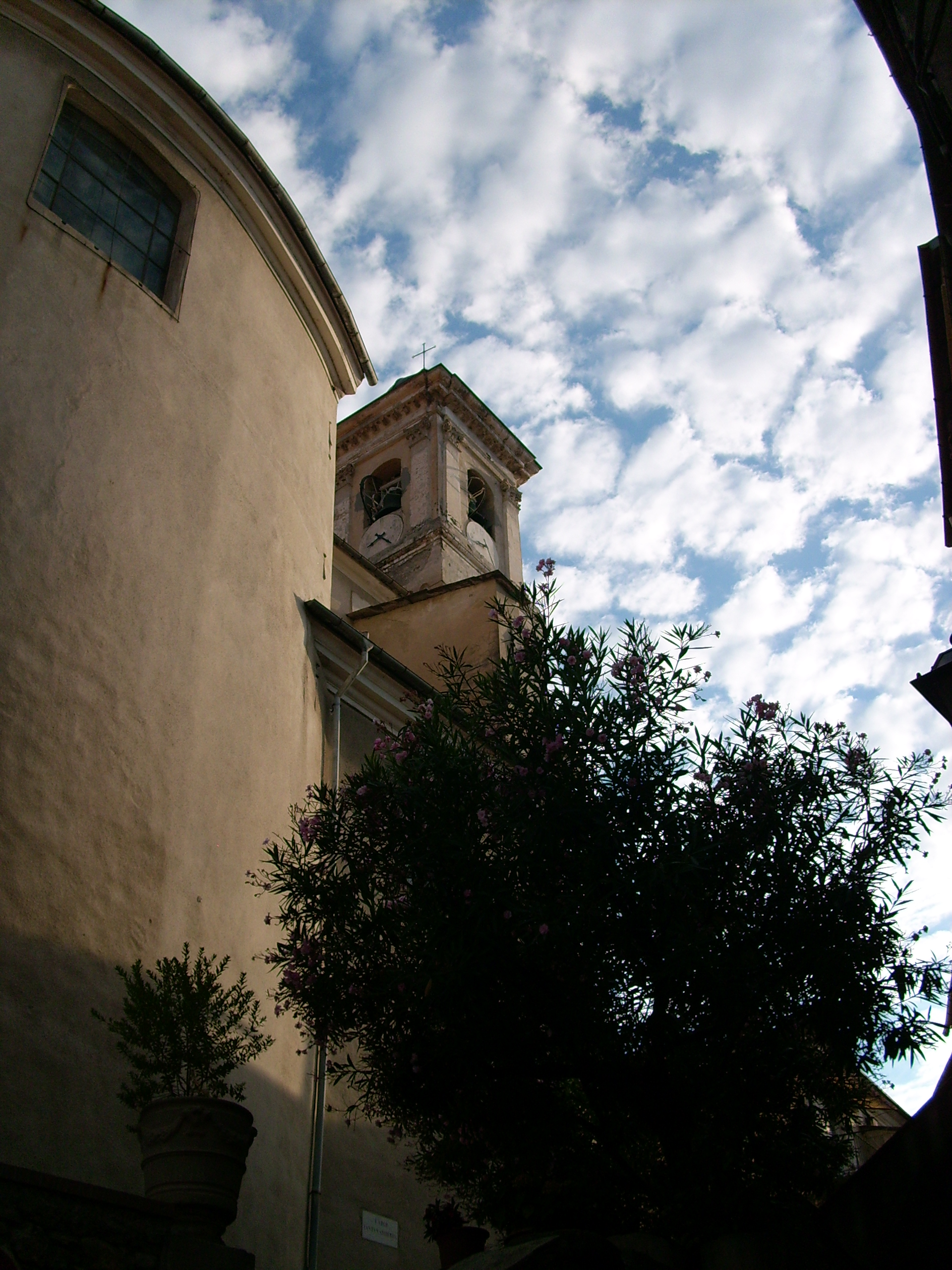 Campanile della chiesa di santa Margherita d'Antiochia di Pontedassio, Liguria, Italia